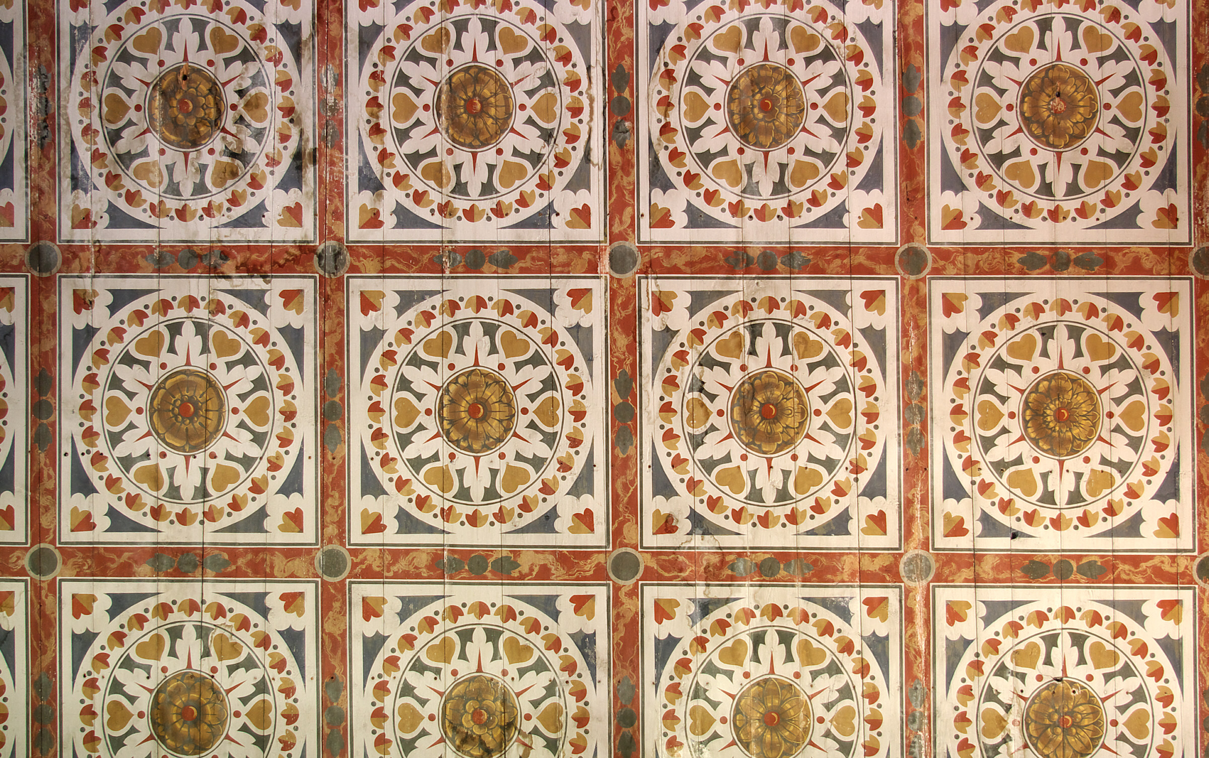 Deckenmalerei im Chor der St. Nikolai-Kirche Altefähr, Rügen